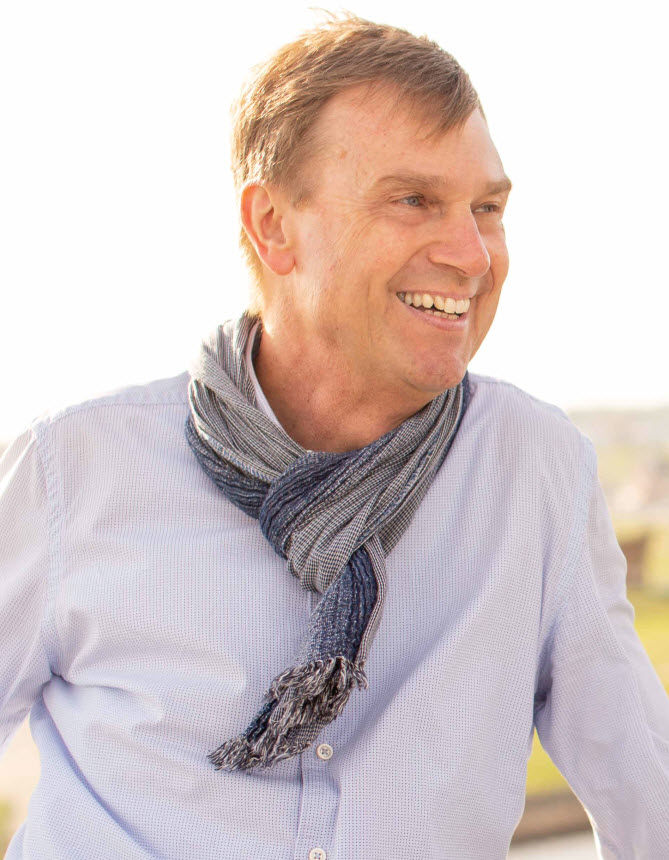 Foto der Landratswahl 2019